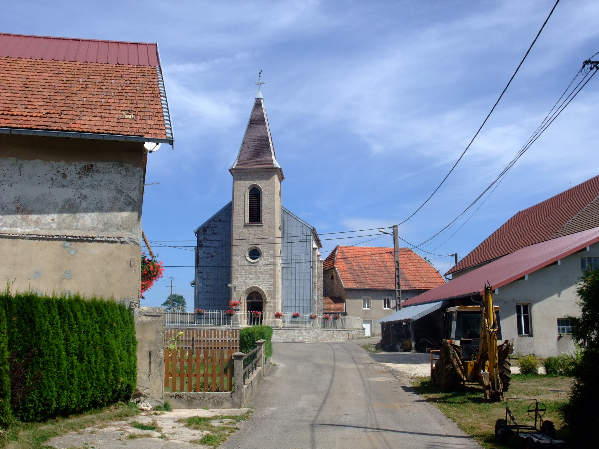 Bugny (Doubs)